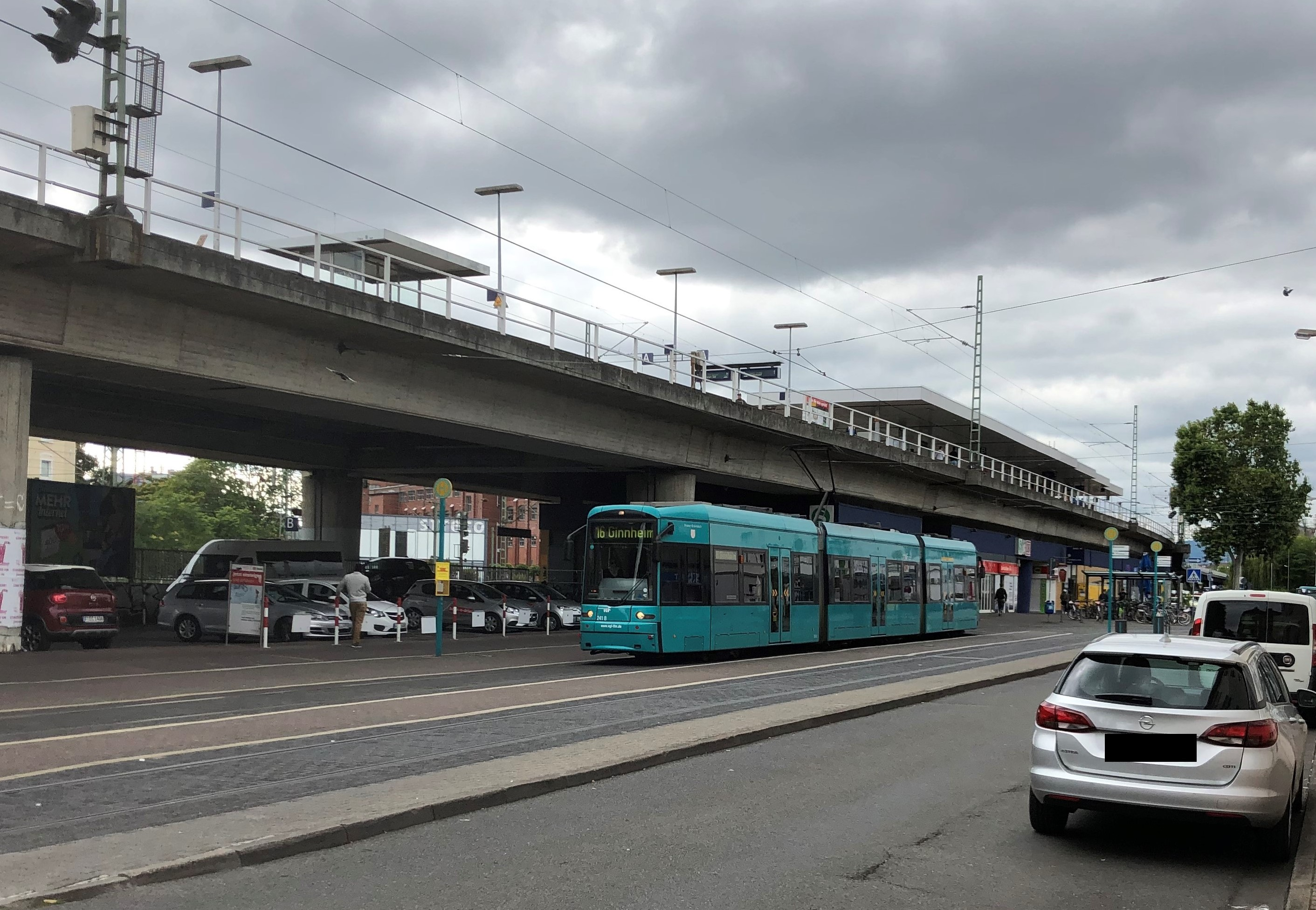 Ein Verstärkerzug der Straßenbahnlinie 16 hält am Bahnhof Frankfurt (Main) West.